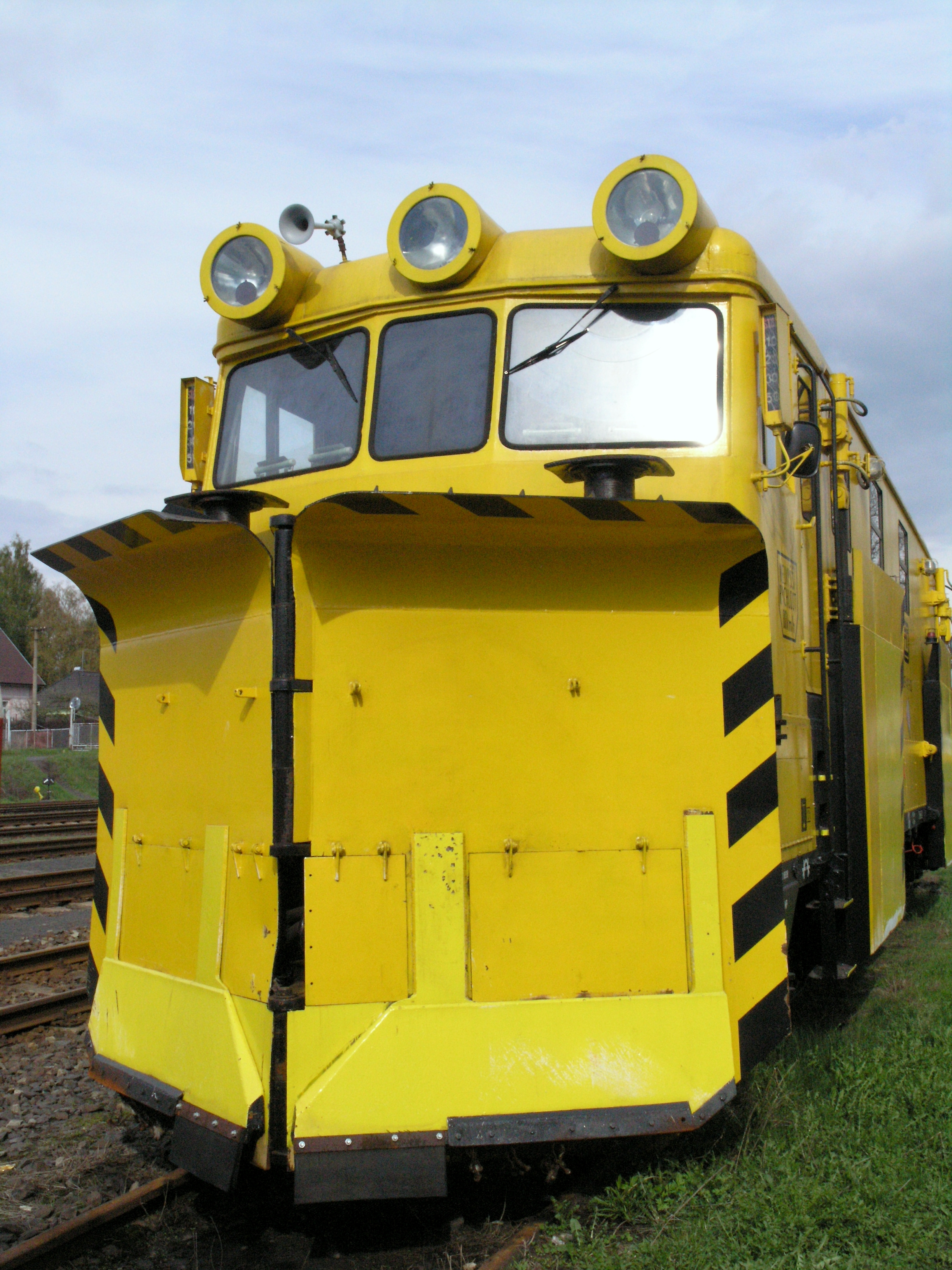 KSP 411 S-132 na nádraží v Rumburku